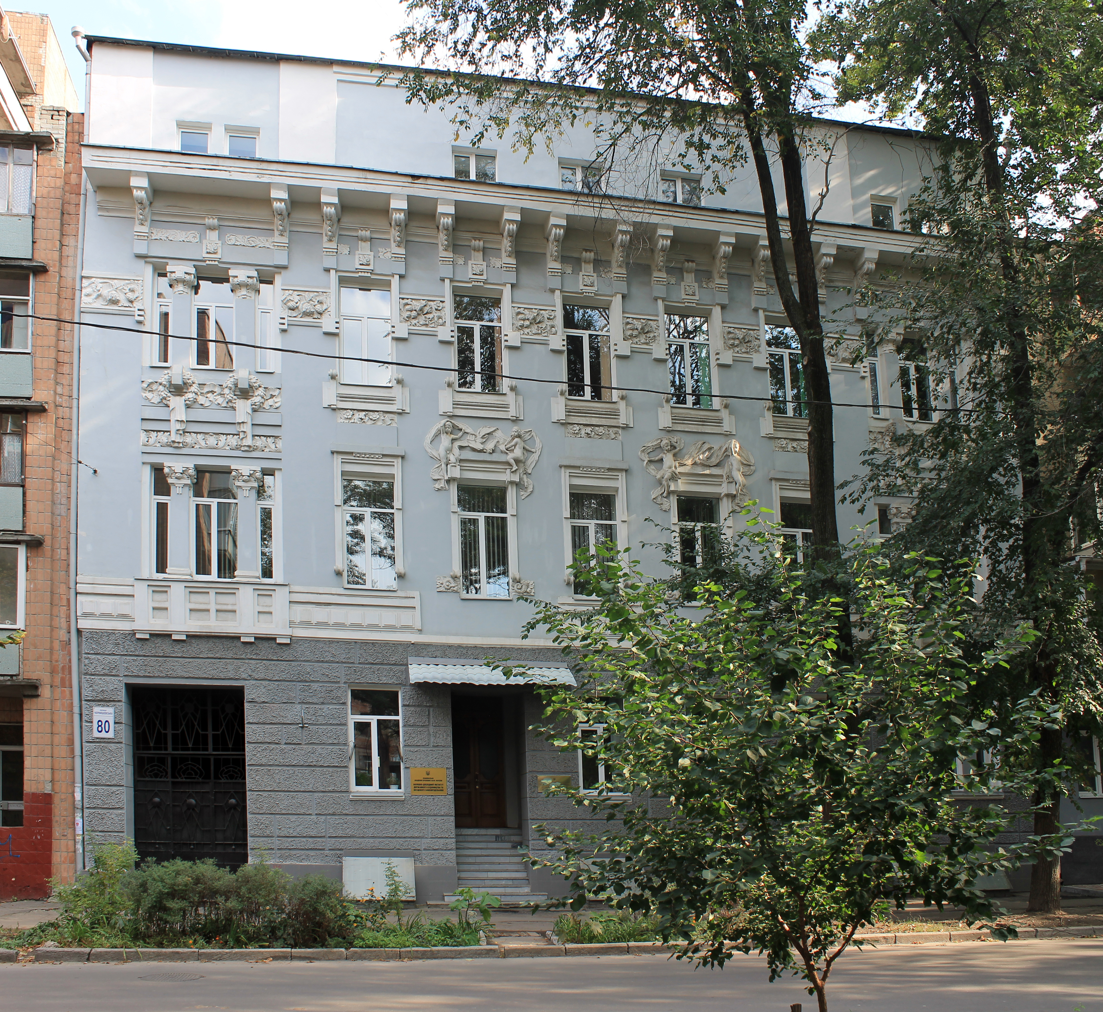 Колишній прибутковий будинок 1905р., вул.Чернишевська,80, м.Харків